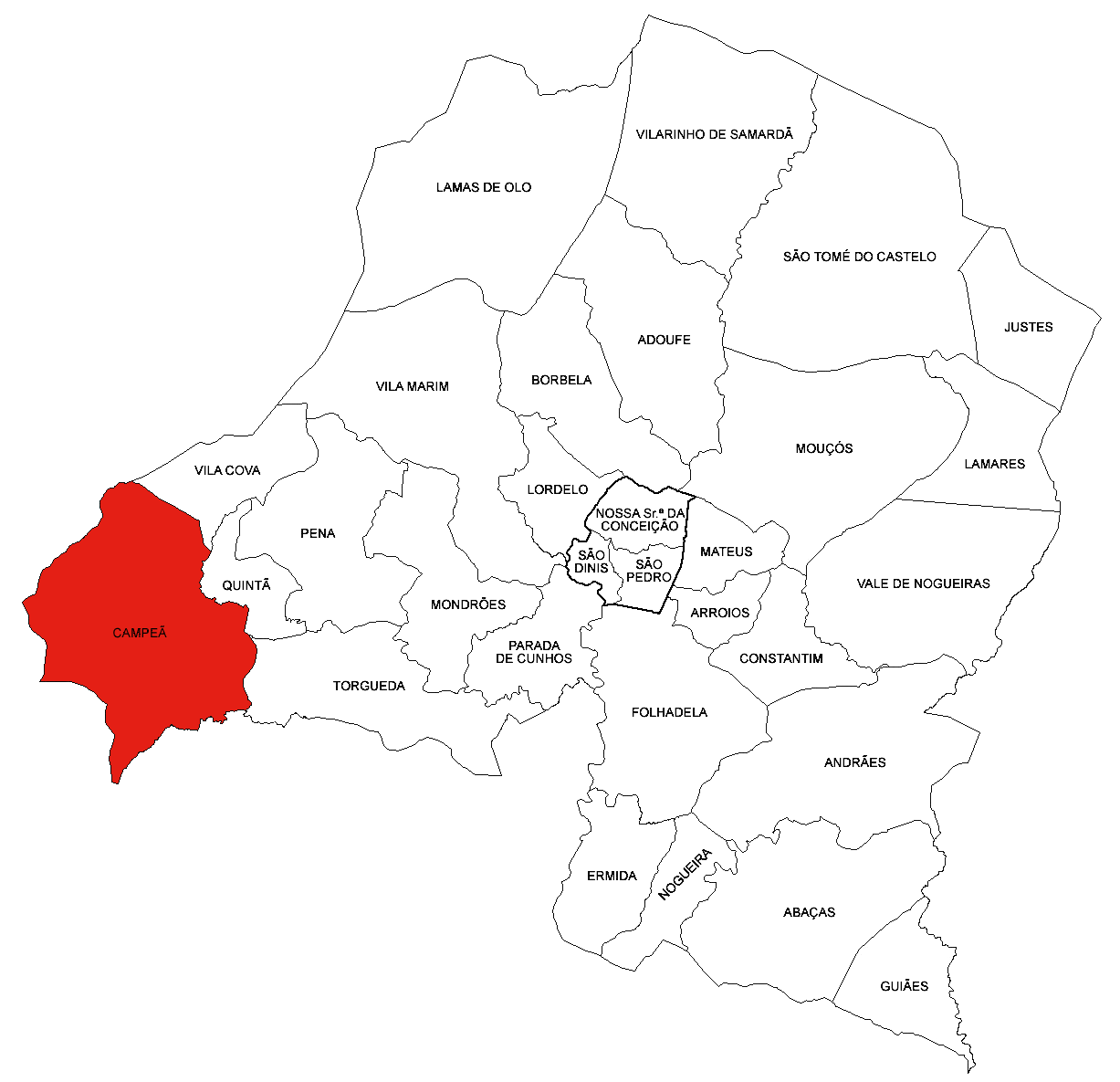 Freguesia da Campeã (concelho de Vila Real)